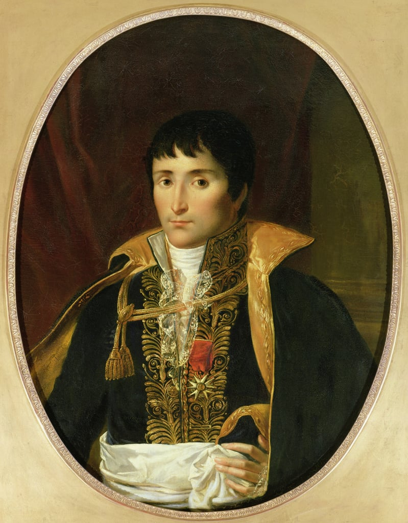 Robert Lefevre "Portrait of Lucien Bonaparte (1775-1840)"